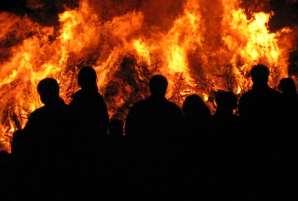 Mensen bekijken paasvuur in Eibergen (gemeente Berkelland), 16 april 2006. Foto van J. ter Huurne URL